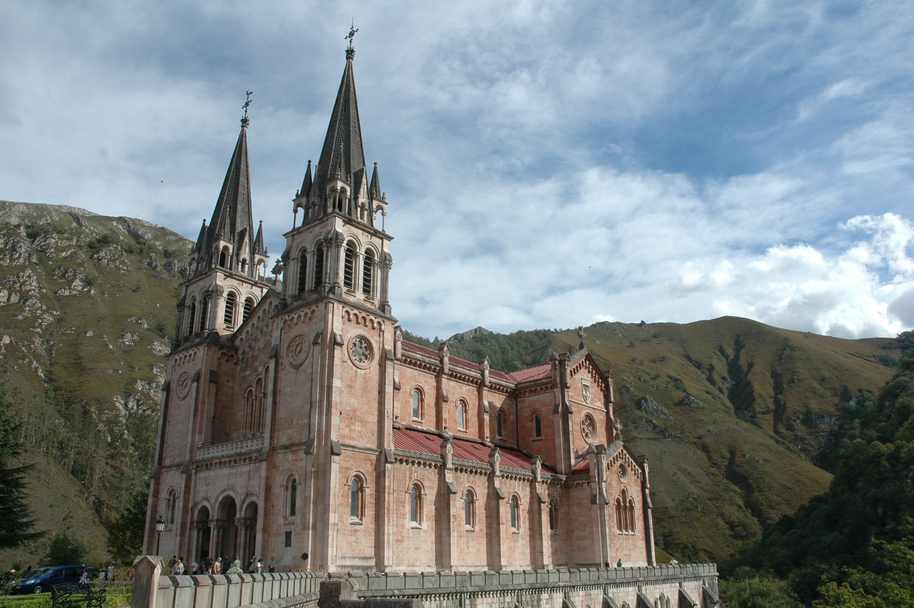 Basílica de Santa María la Real de Covadonga Taken on Covadonga (Asturias - Spain) on October 2005.